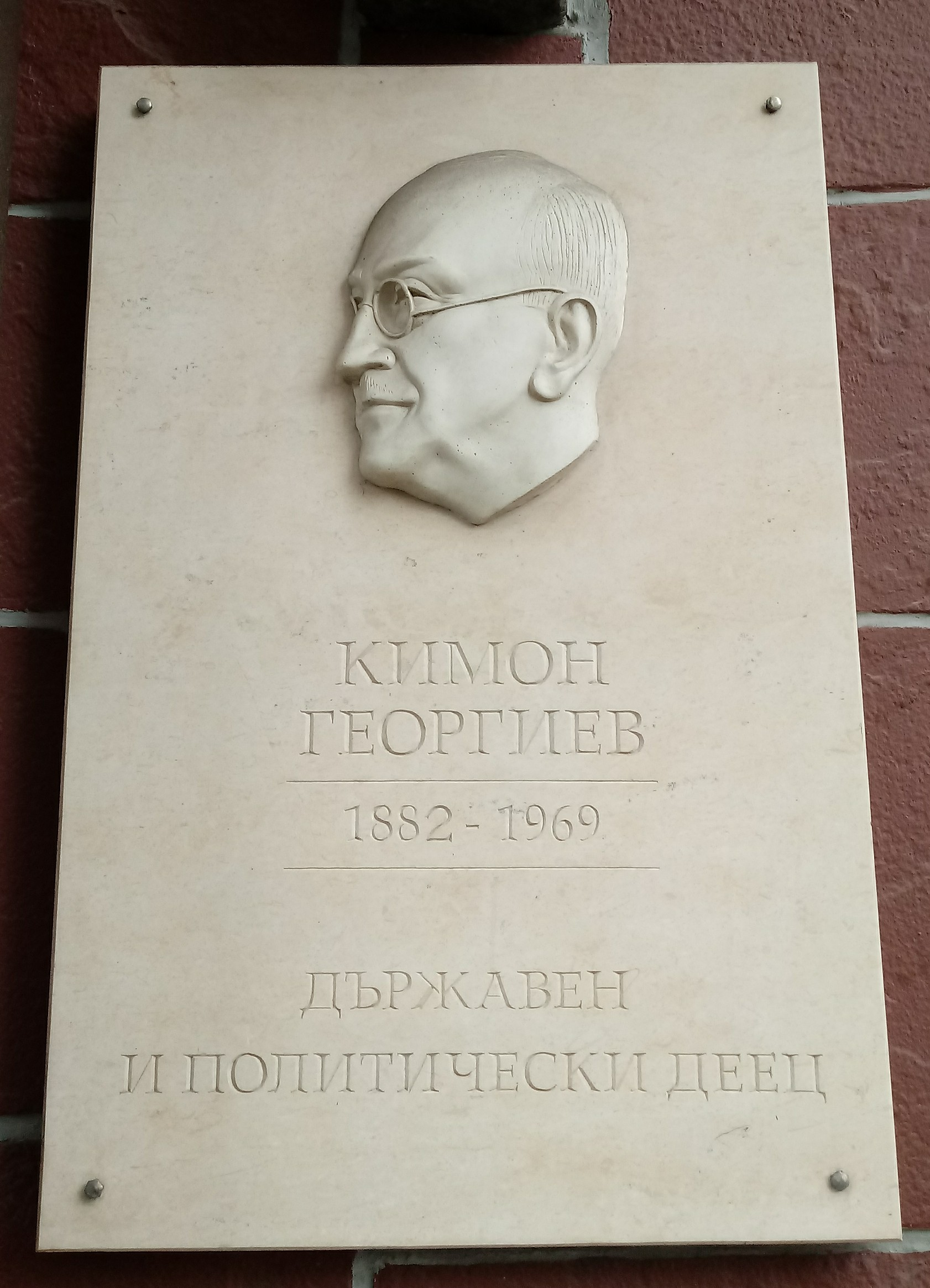 Kimon Georgiev memorial plaque, 11 Geneva Str, Sofia